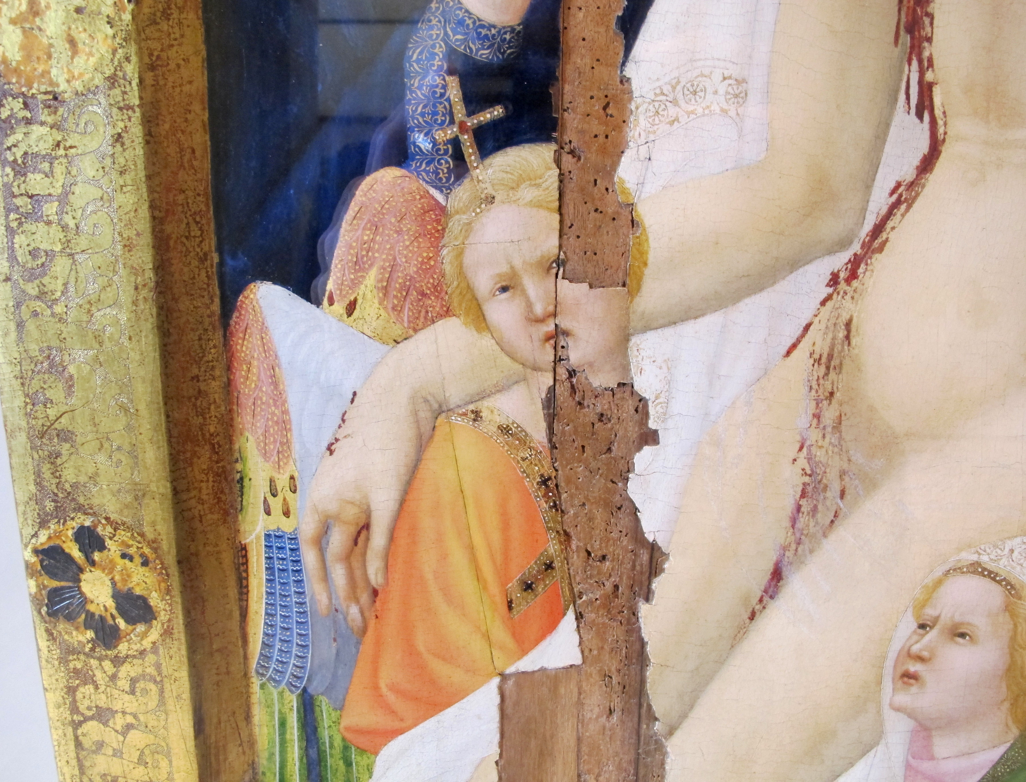 detail